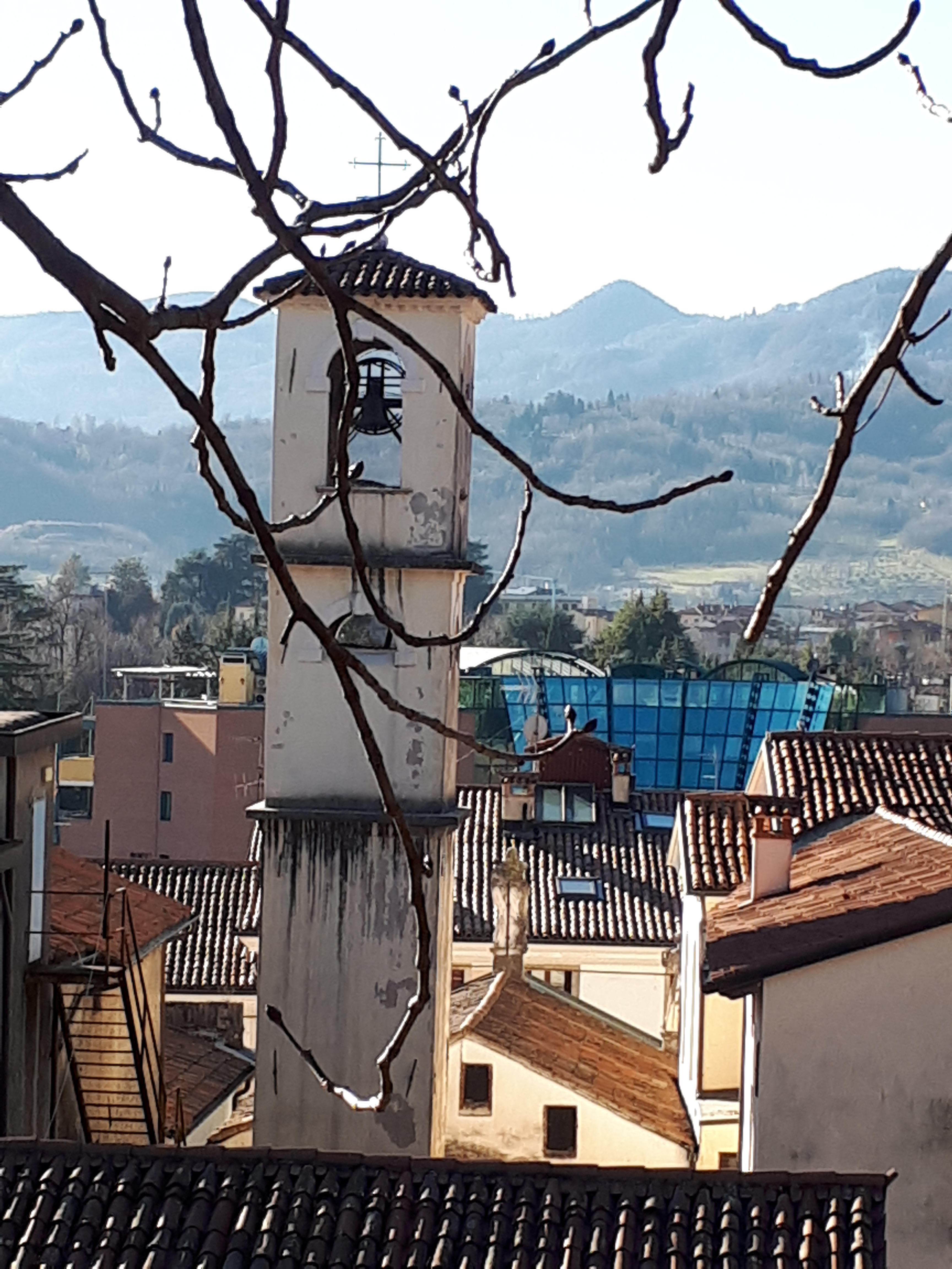 Campanile, chiesa dell'Incoronata, Schio